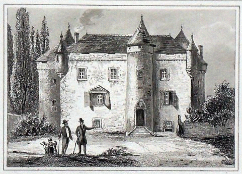 Château d'Auzers, gravure, début XIXe siècle.